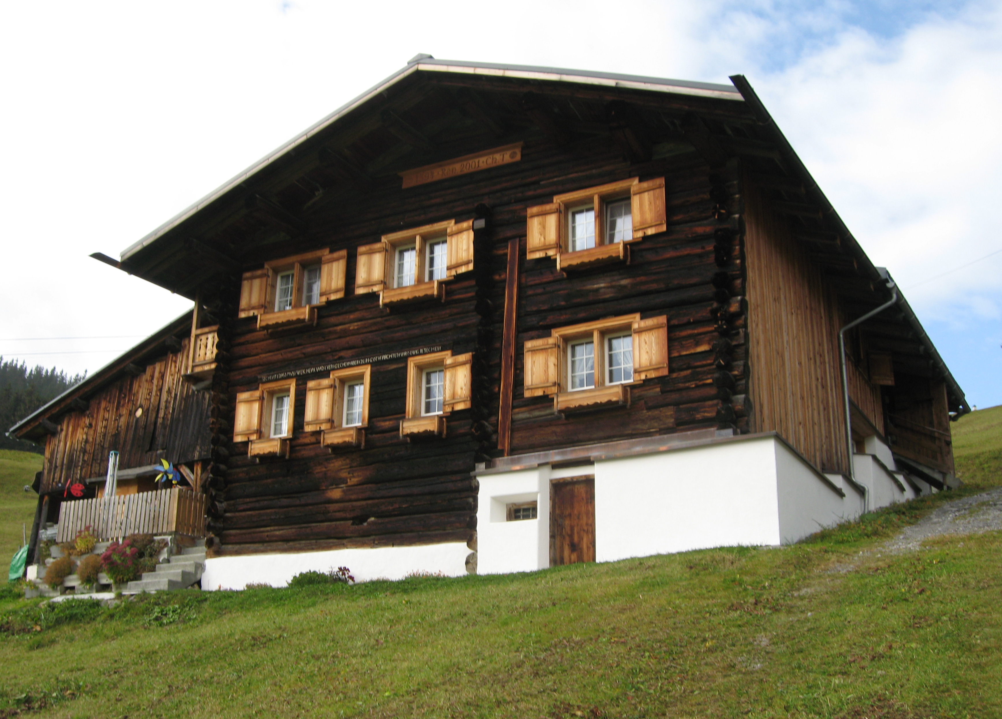 Haus von 1394 in St. Antönien, unterhalb Bord